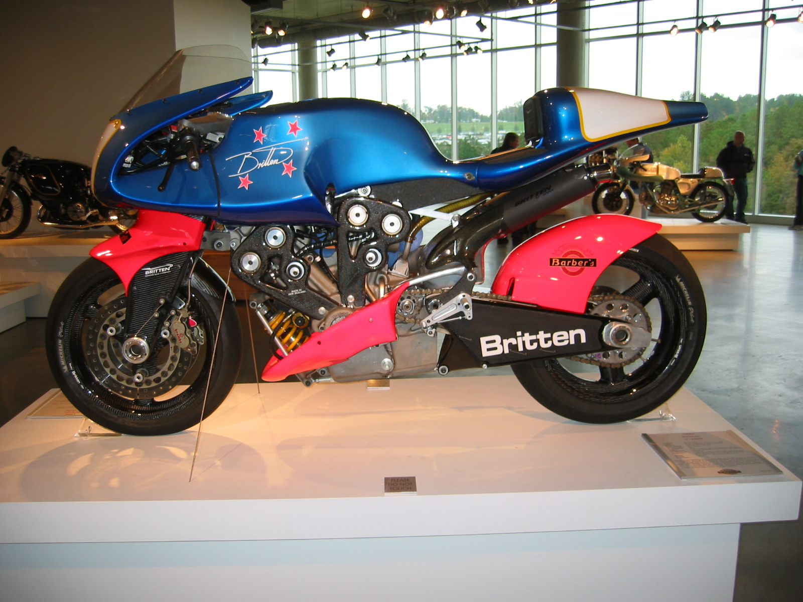 Barber Museum 10.2006 (53) Britten V1000 / More description is here